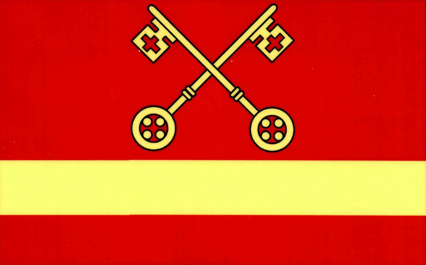 Vlajka obce Kamenný Most (okres Kladno)